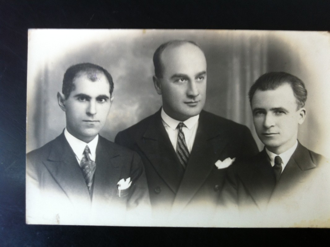 Яне Хаджиянев със съратници